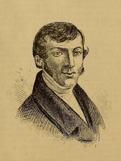 Portrait du goguettier Émile Debraux.